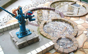 加古川グリーンシティ防災井戸